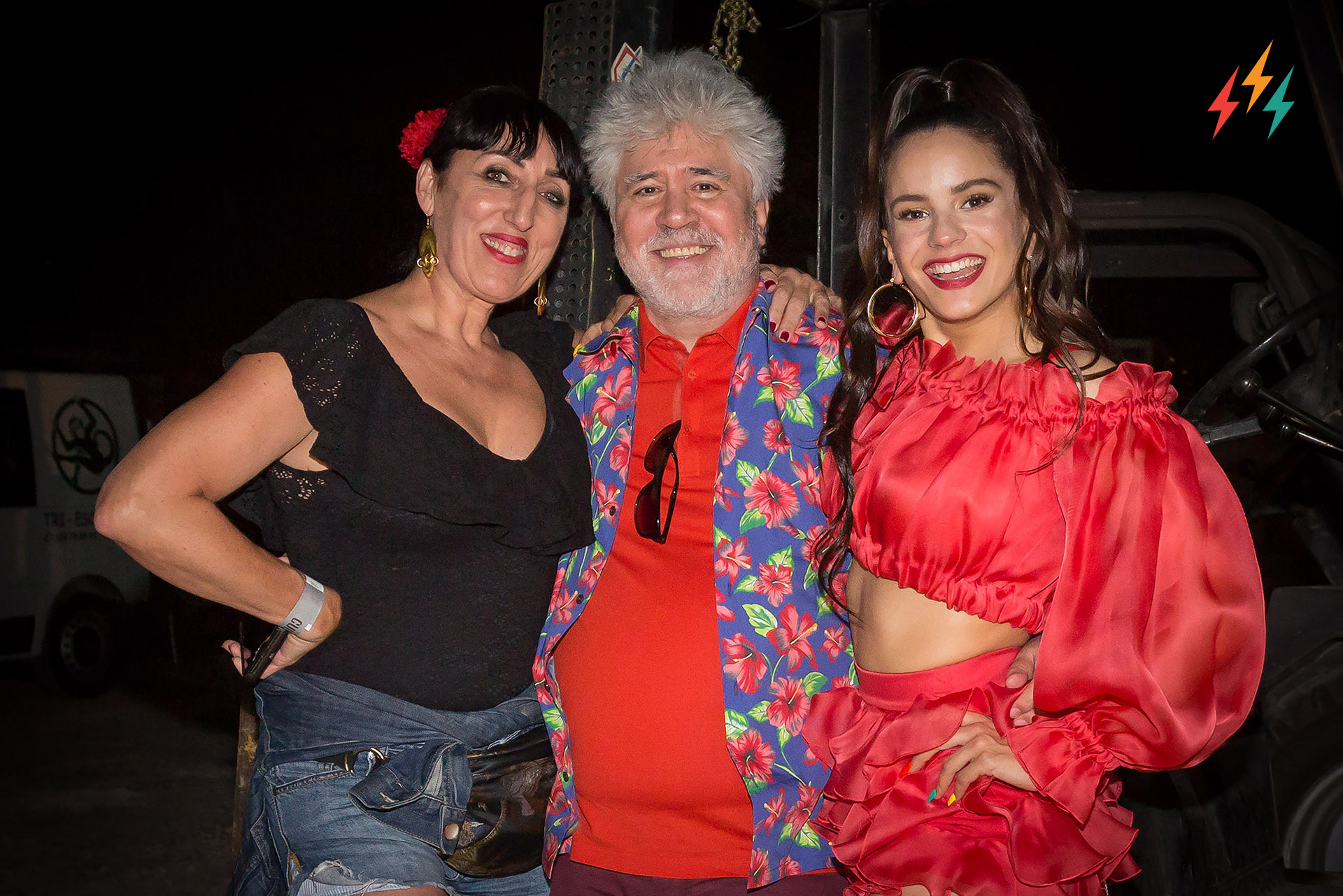 Rosalía, Rosy de Palma y Pedro Almodovar en el Festival Cultura Inquieta